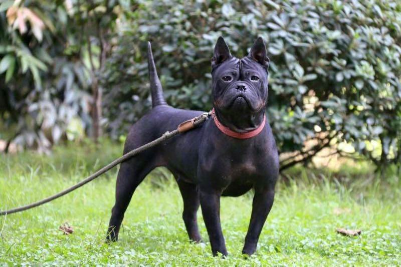 Chinese_Chongqing_Dog_Hündin